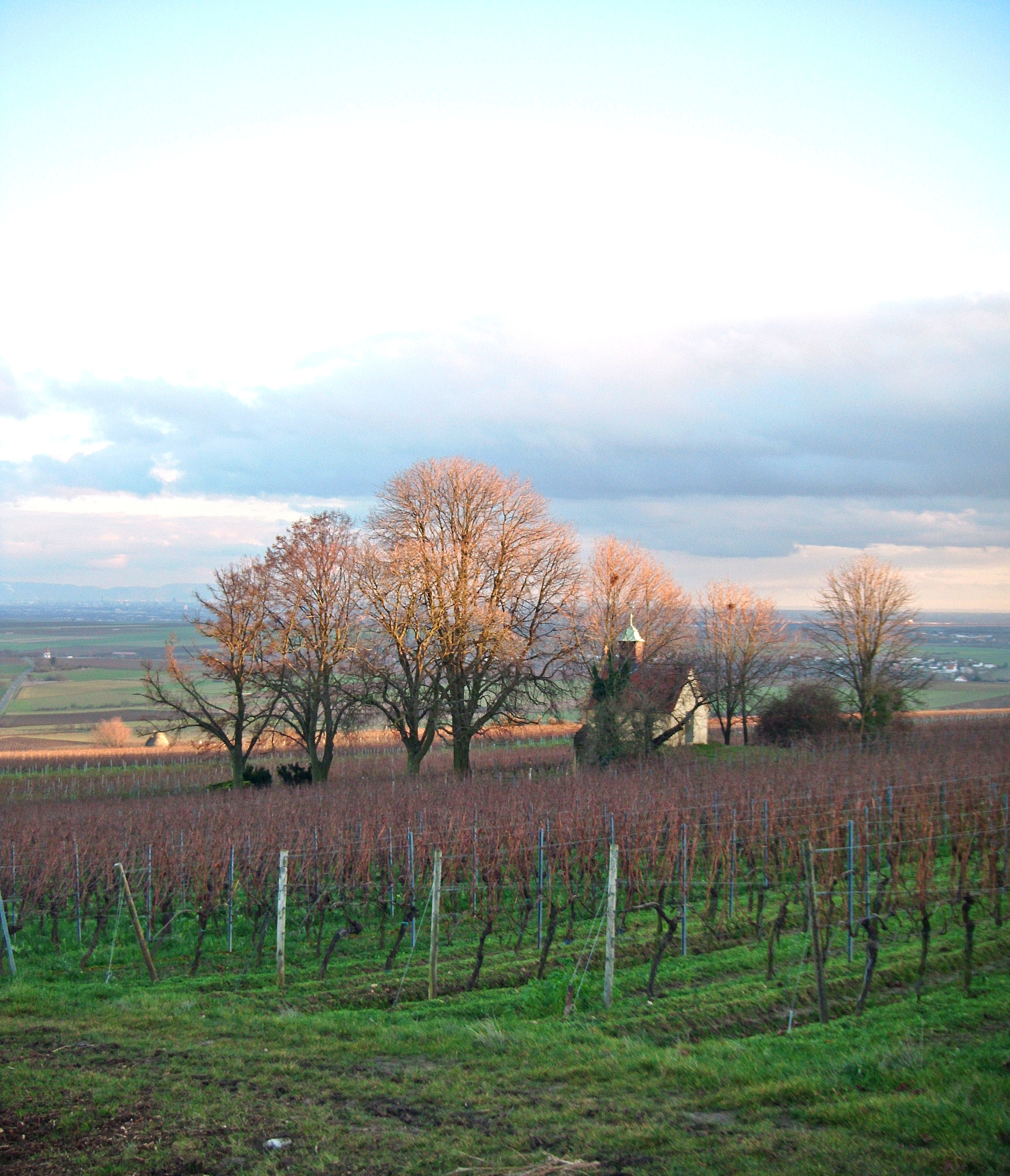 Bockenheim an der Weinstraße, Heiligenkirche (St. Peter), von Westen, zum Odenwald hin aufgenommen